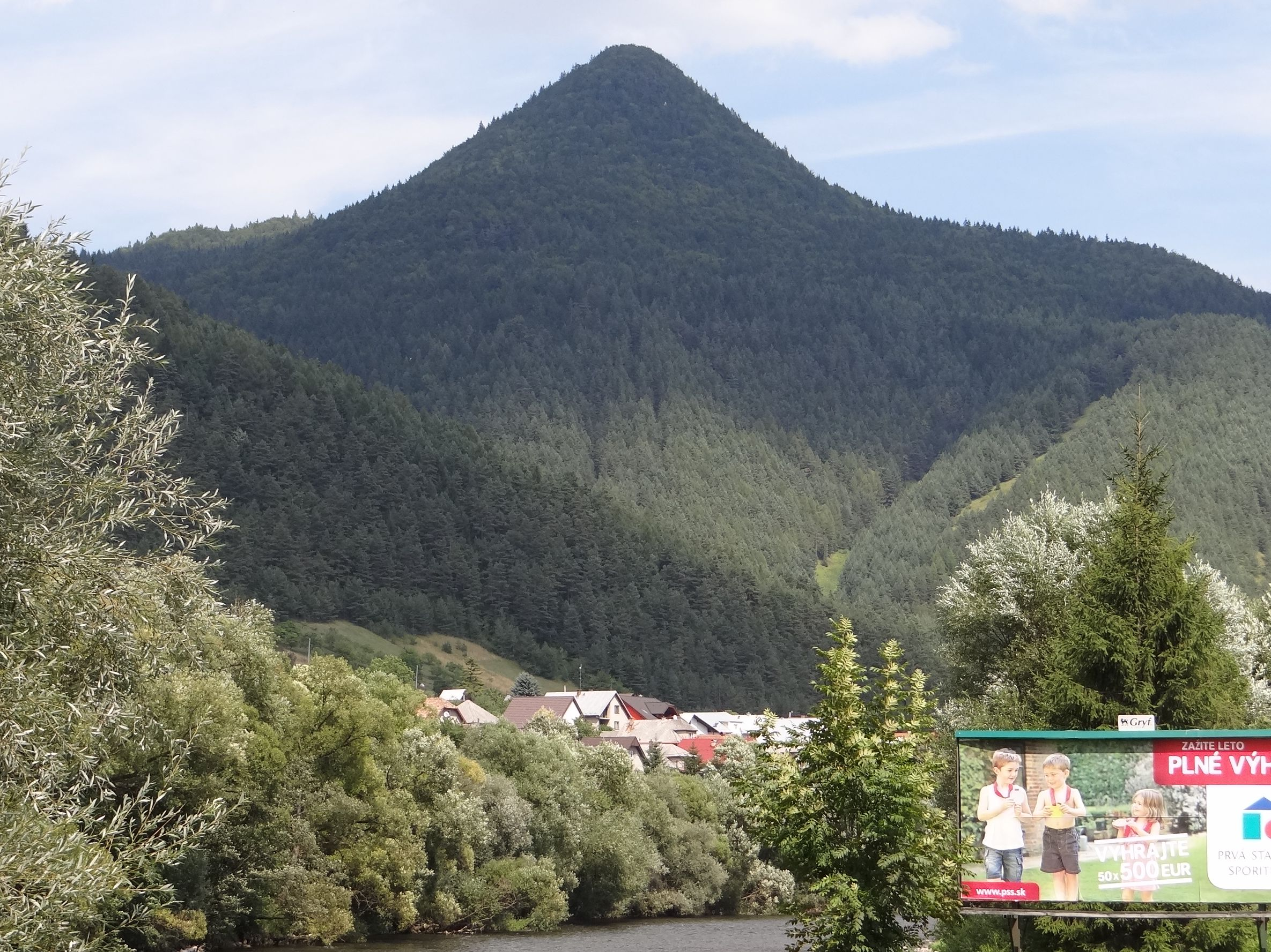 Stankovany, vrch Ostré